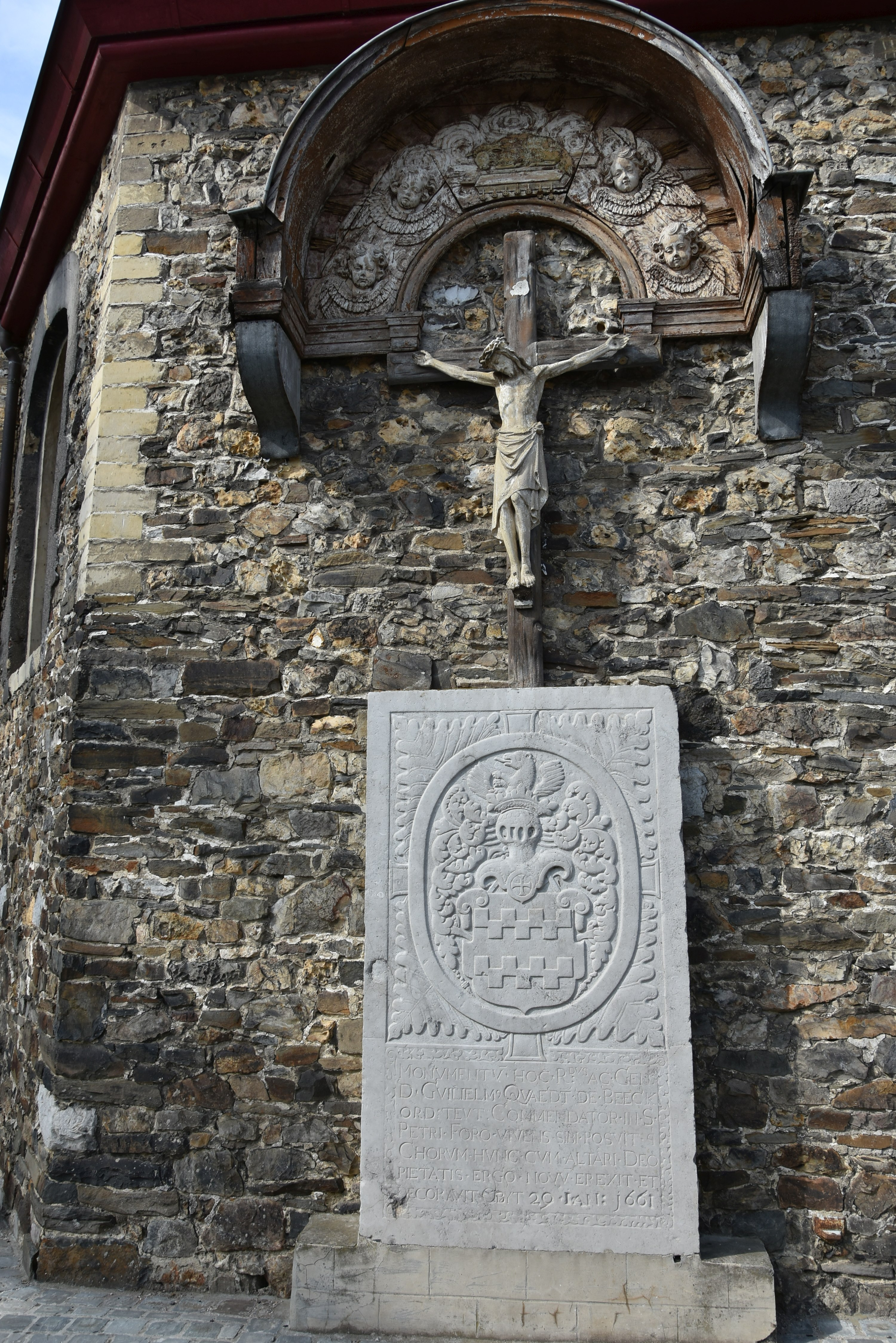 Sint-Pieters-Stoelkerk (Sint-Pieters-Voeren) 29-08-2018 11-19-32 This photo of immovable heritage has been taken in the Flemish Region